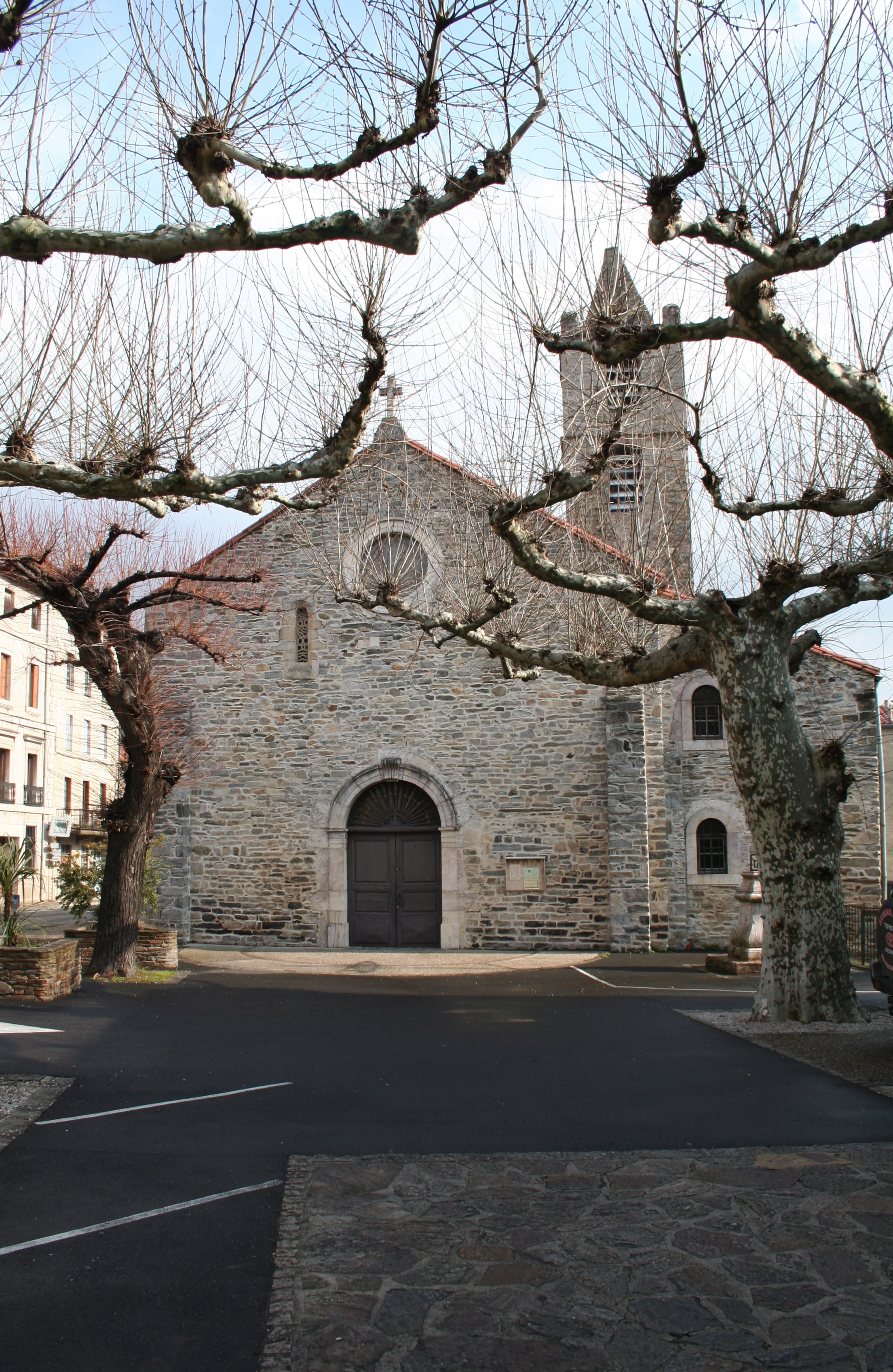 Riols (Hérault) - église Saint-Pierre - façade occidentale.